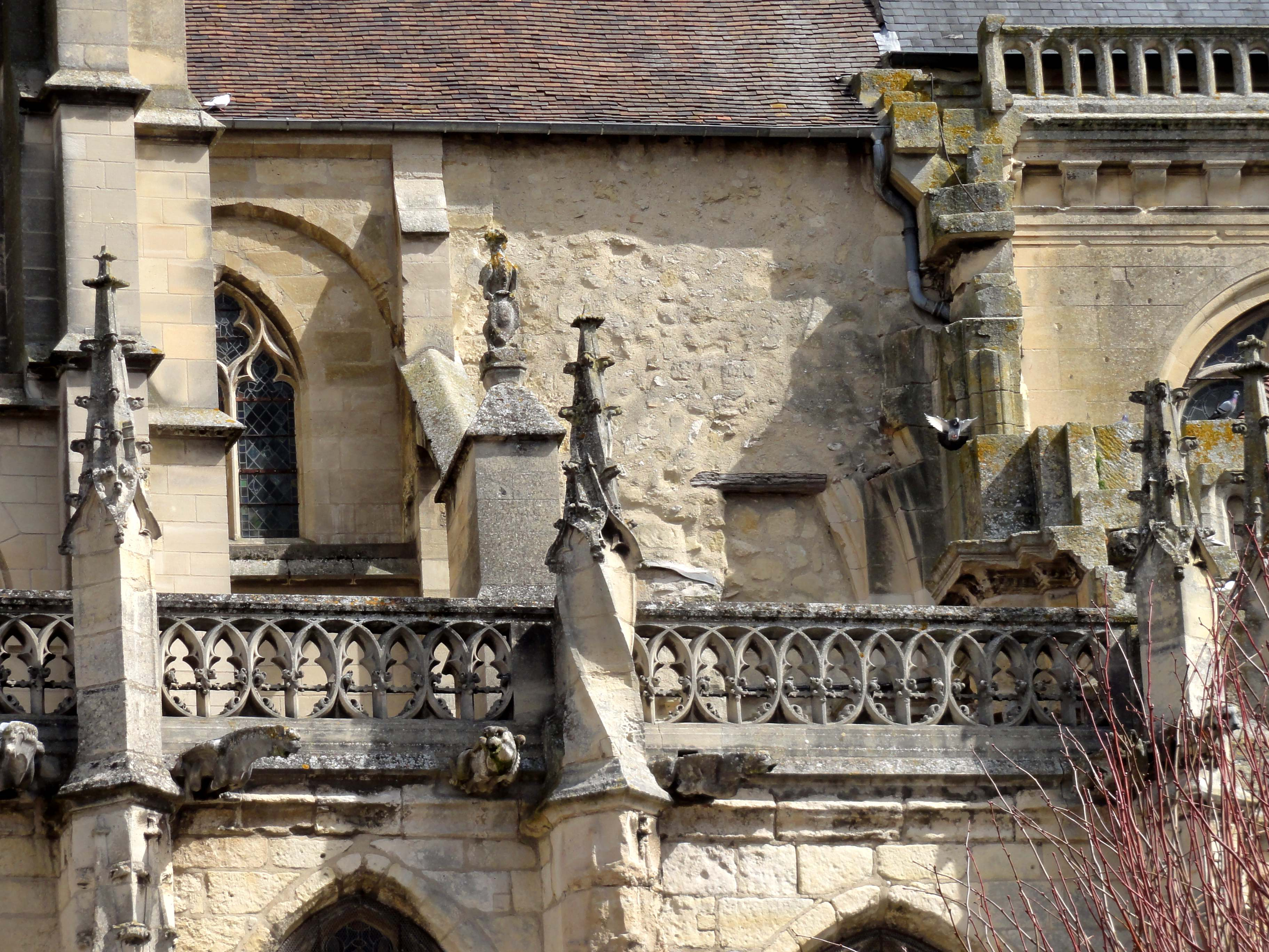 Église Saint-Martin - voir titre.